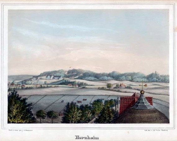 "Hornheim vom Thurme der Felsenhalle", Farblithographie